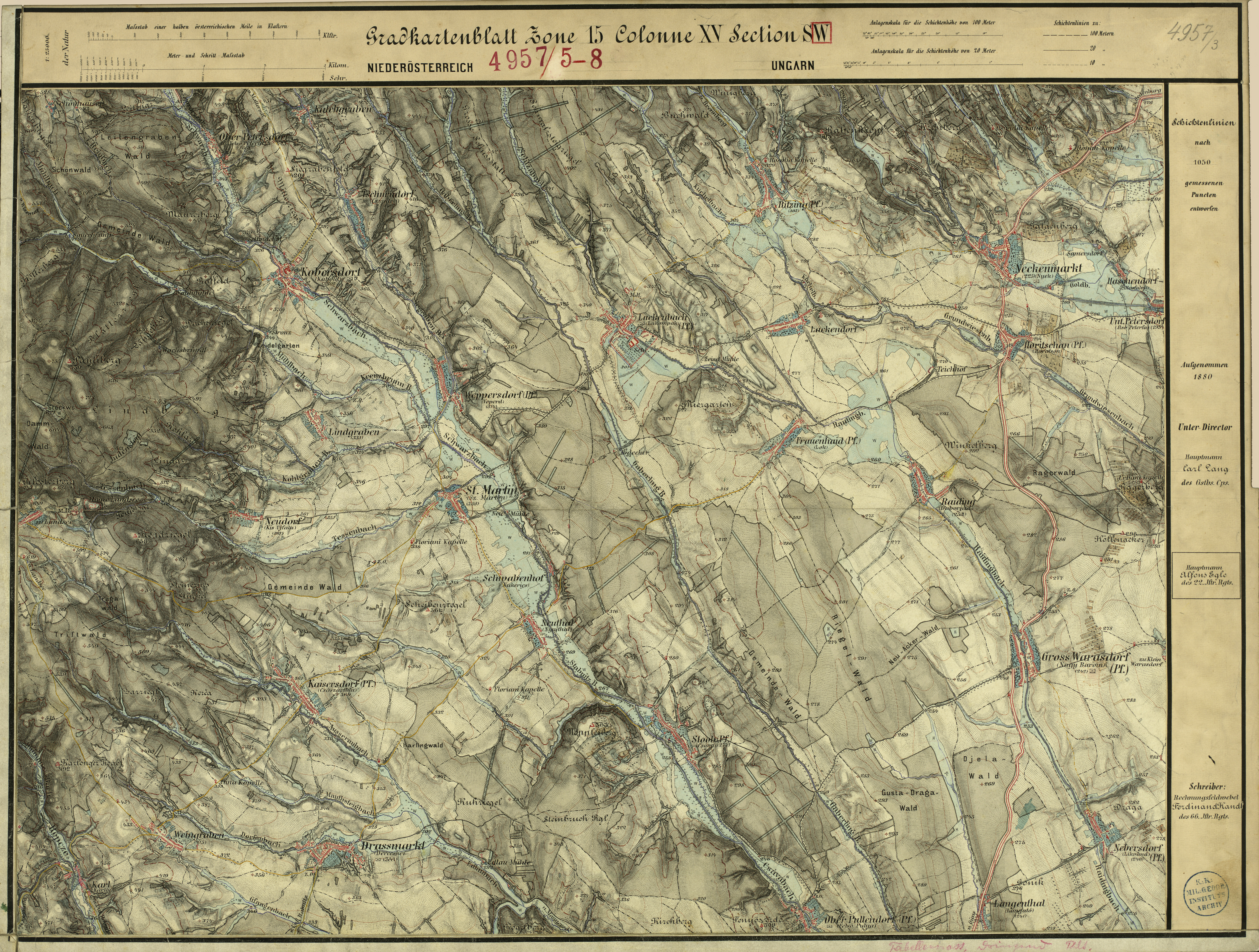 historische Landkarte: Gradkartenblatt Zone 15 Colonne XV Section SW (später 4957/3). Kobersdorf, Ober Petersdorf, Ritzing, Neckenmarkt, Horitschon, Drassmarkt, Stoob, Lackenbach, Weppersdorf, St. Martin, Neudorf, Landsee, Kaisersdorf, Groß Warasdorf im Burgenland, Österreich und Westungarn. Franzisco-josephinische (3.) Landesaufnahme der österreichisch-ungarischen Monarchie. Aufnahmeblatt 1:25.000.